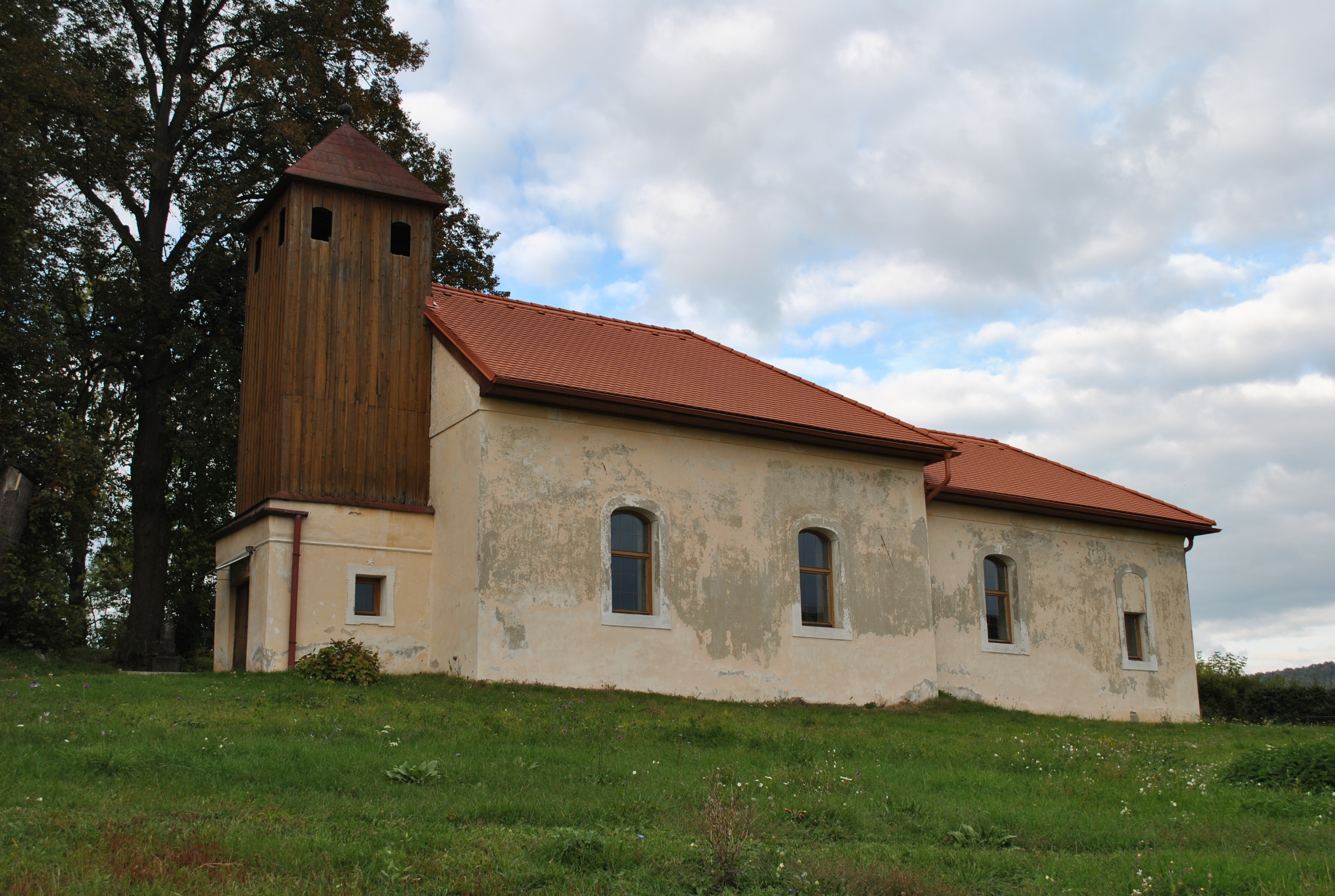 Bacúrov (okr. Zvolen), Kostol svätých Šimona a Júdu